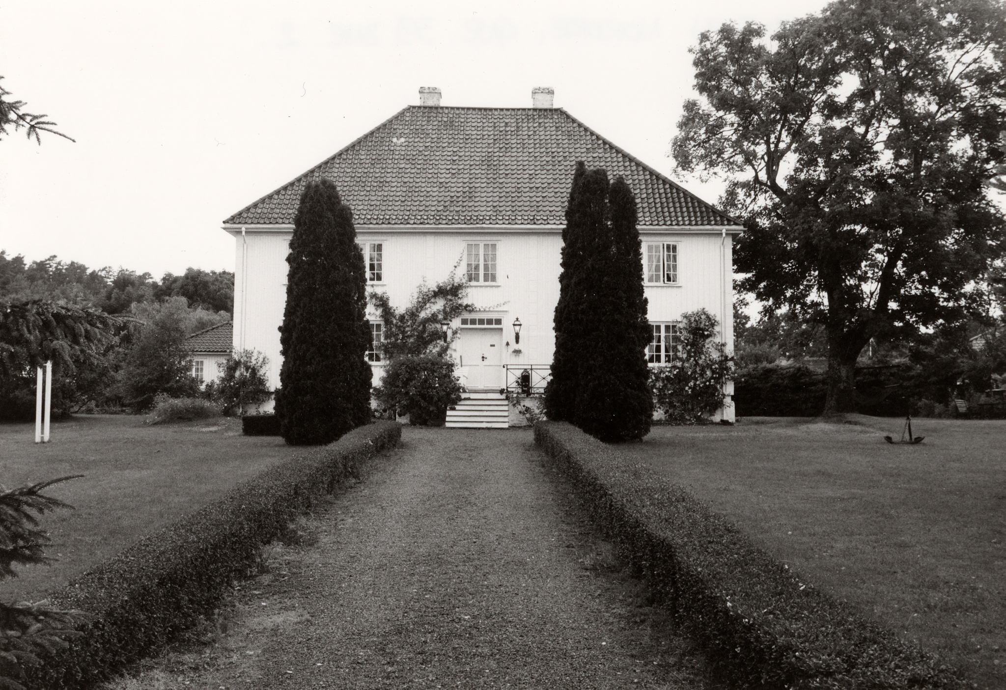 Nordre Sand, Nøtterøy.